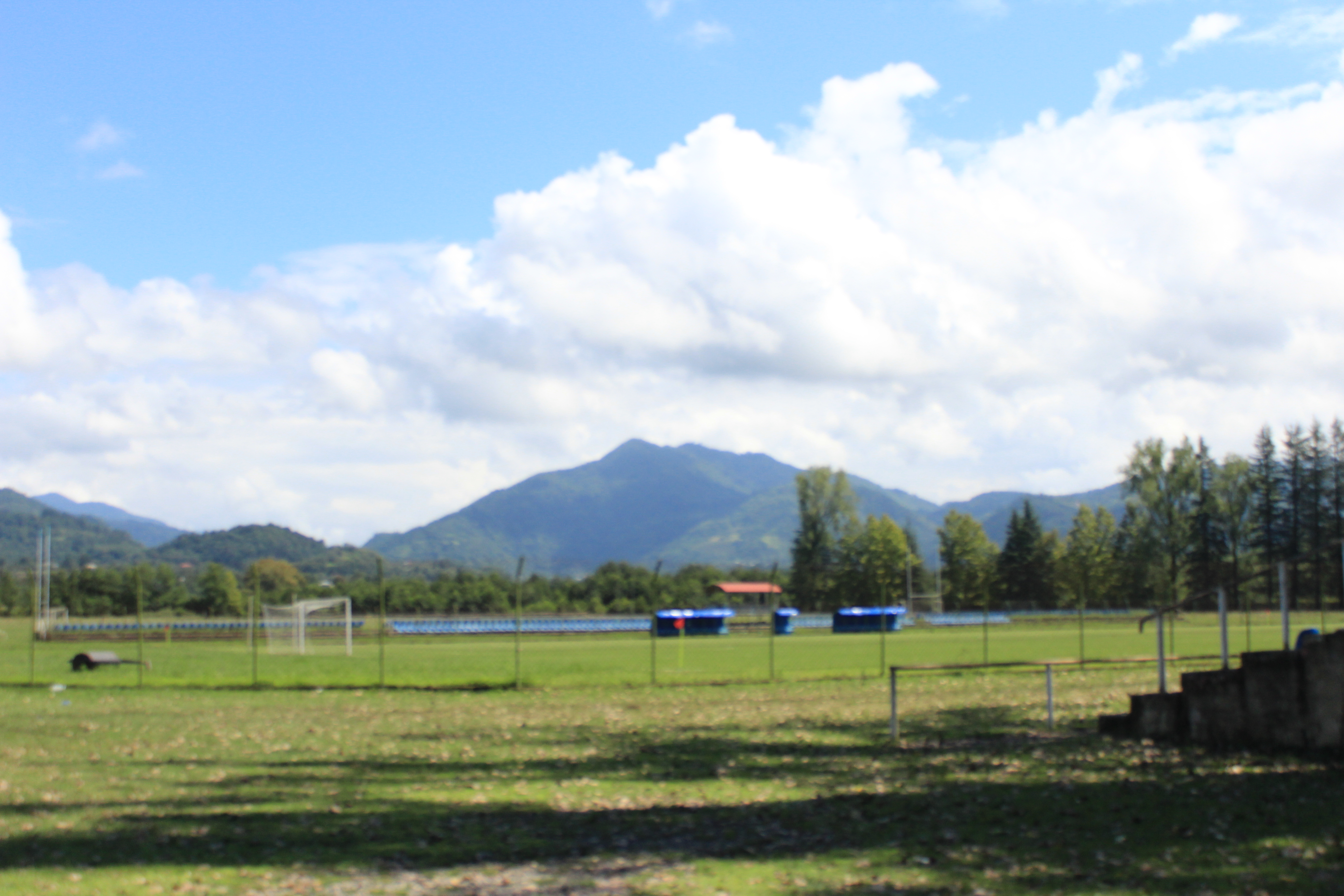 ბორის პაიჭაძის სახელობის სტადიონი ჩოხატაურში